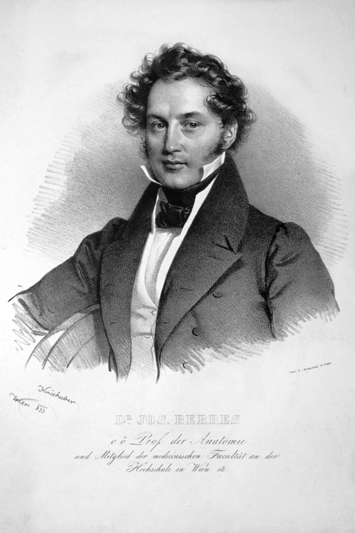 Josef von Berres (1796-1844) Anatom Autodidakt